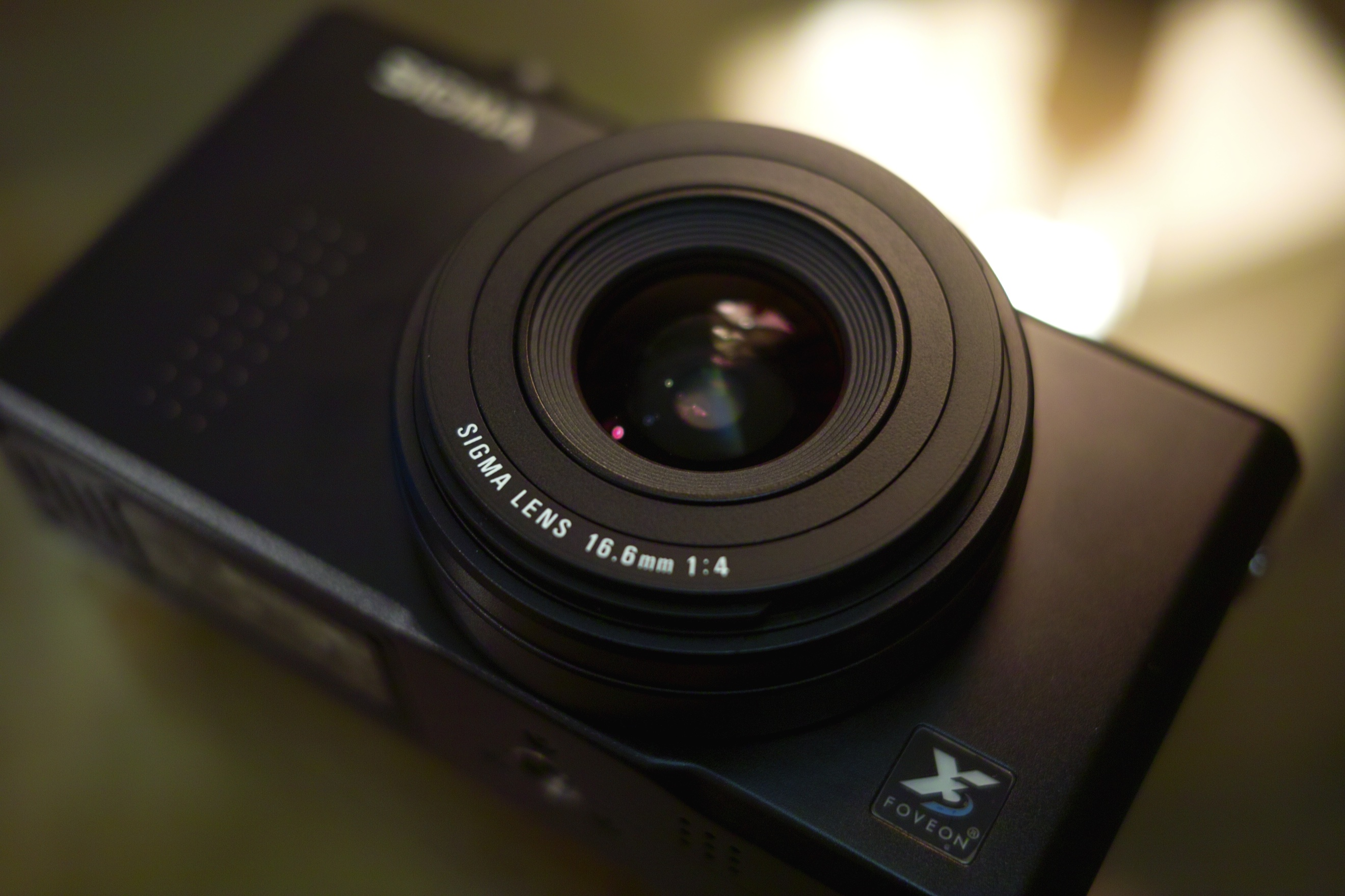 Sigma DP1x taken with Sigma DP2s + Sigma AML-1 macro lens.